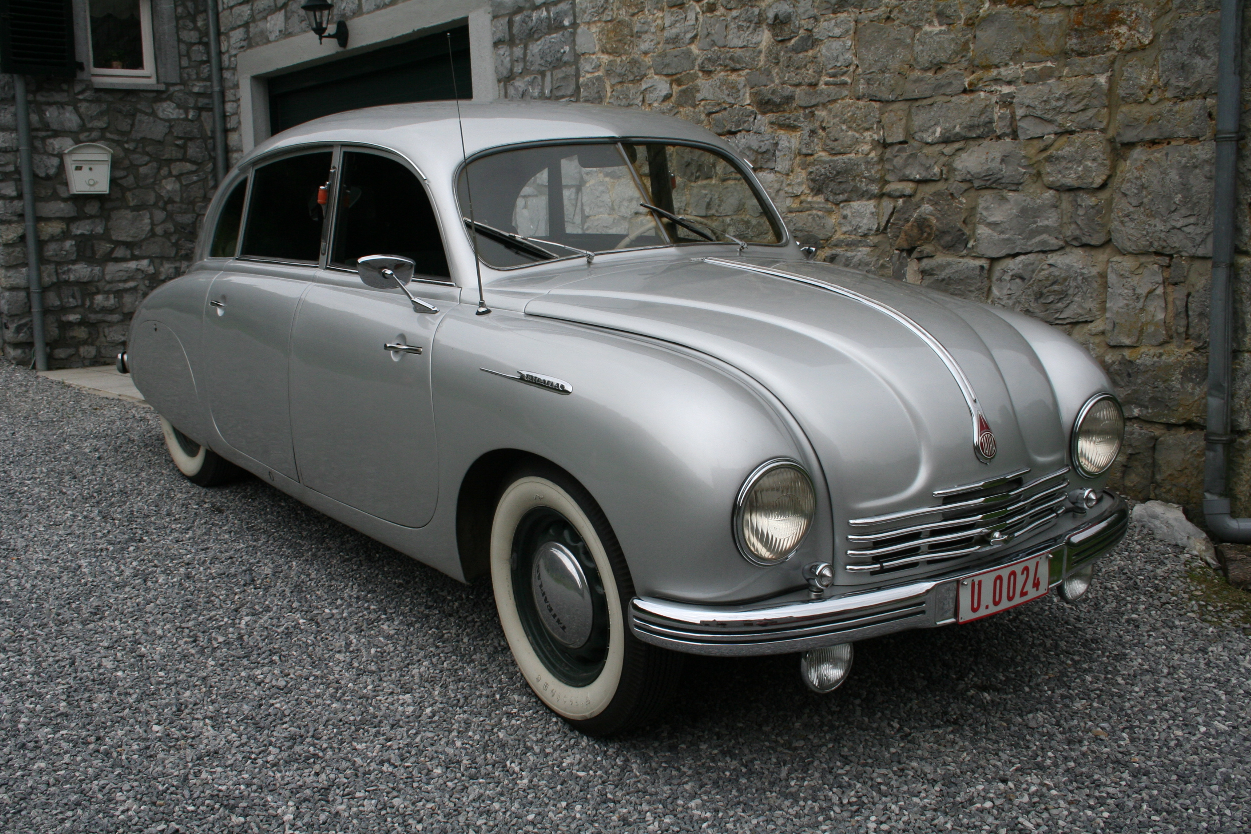 Automobile Tatra T600 Tatraplan.